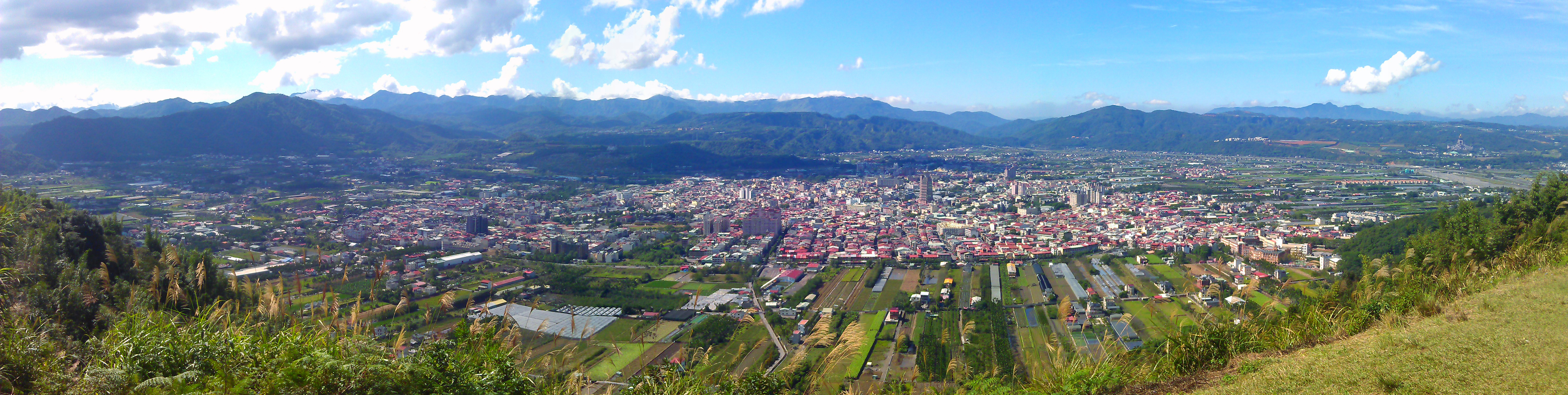 中文（台灣）: 埔里盆地鳥橄